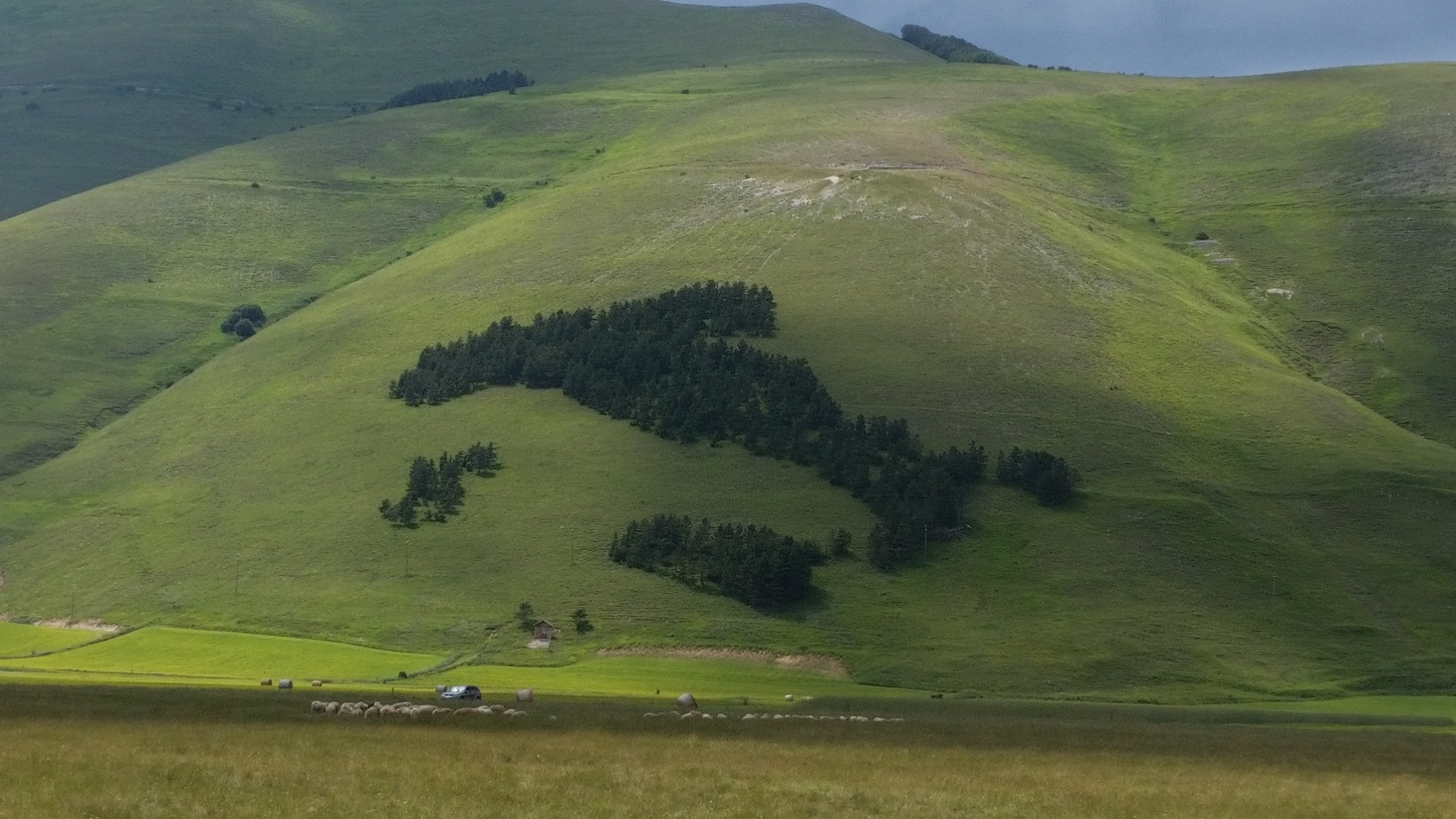 Bosco "Italia", presso Castelluccio di Norcia